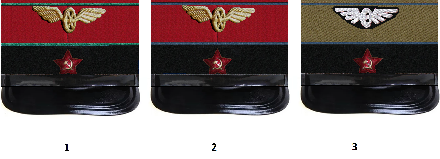 Фуражки восо